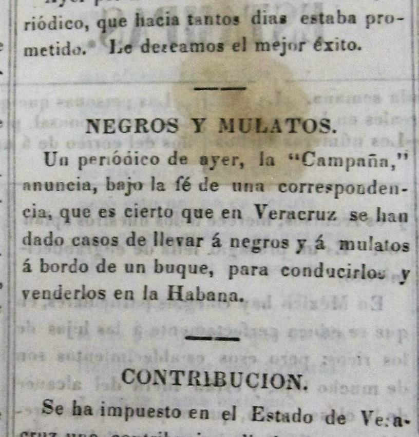 Extracto del periódico mexicano "La Orquesta" de 1862